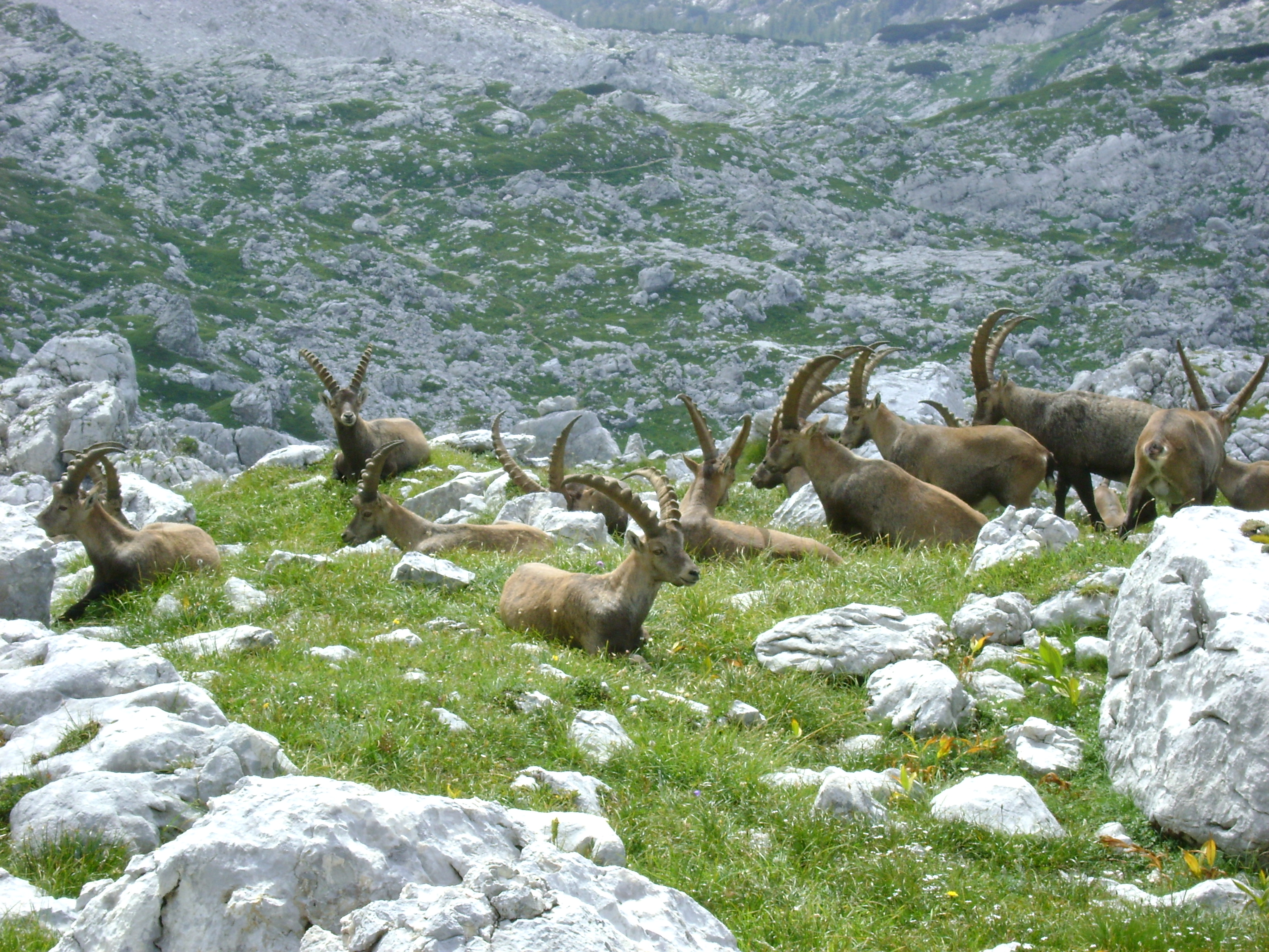 Kozorogi v bližini Koče na Prehodavcih